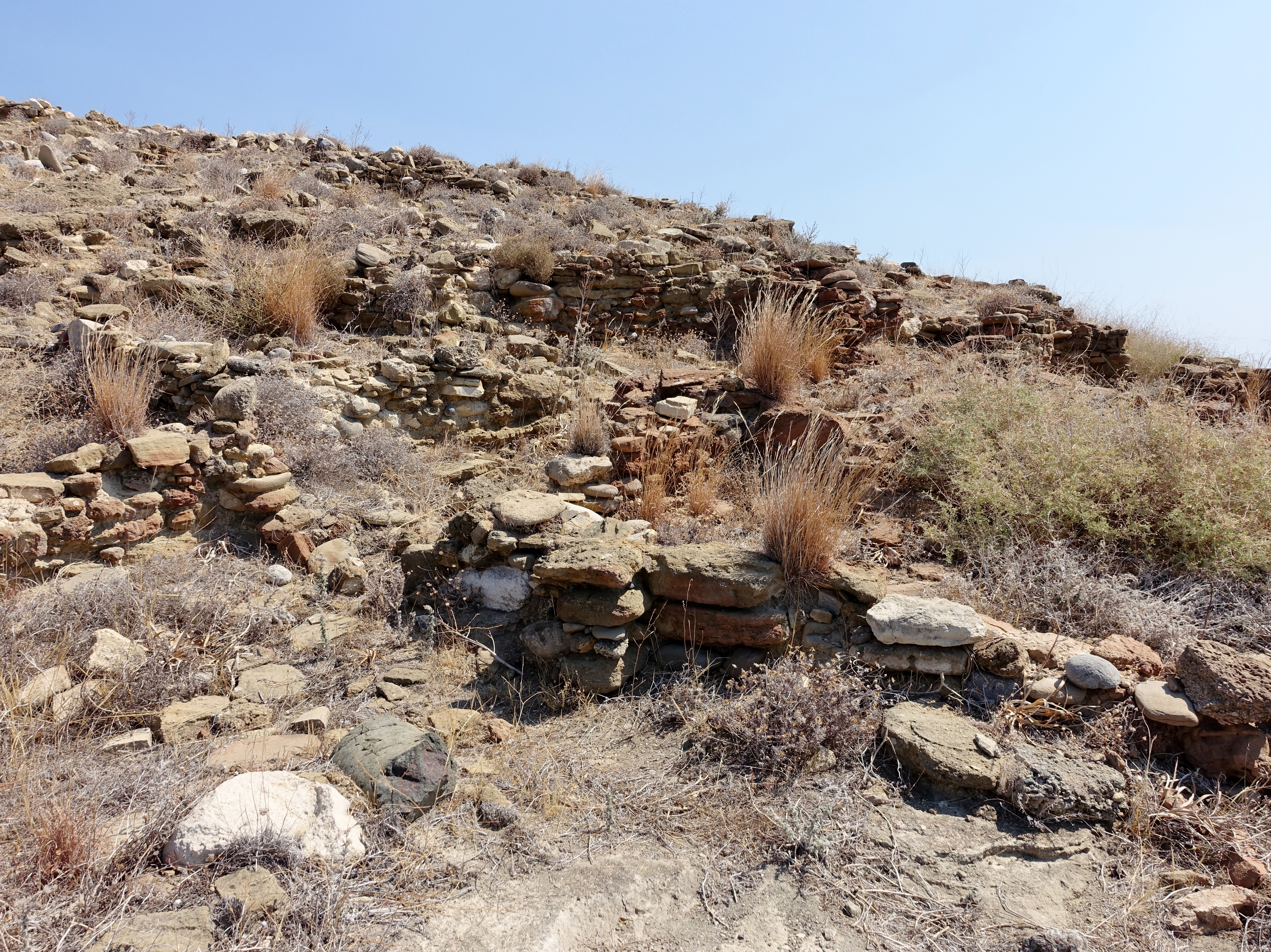 Ausgrabungsstätte von Fournou Koryfi bei Myrtos, Kreta, Griechenland